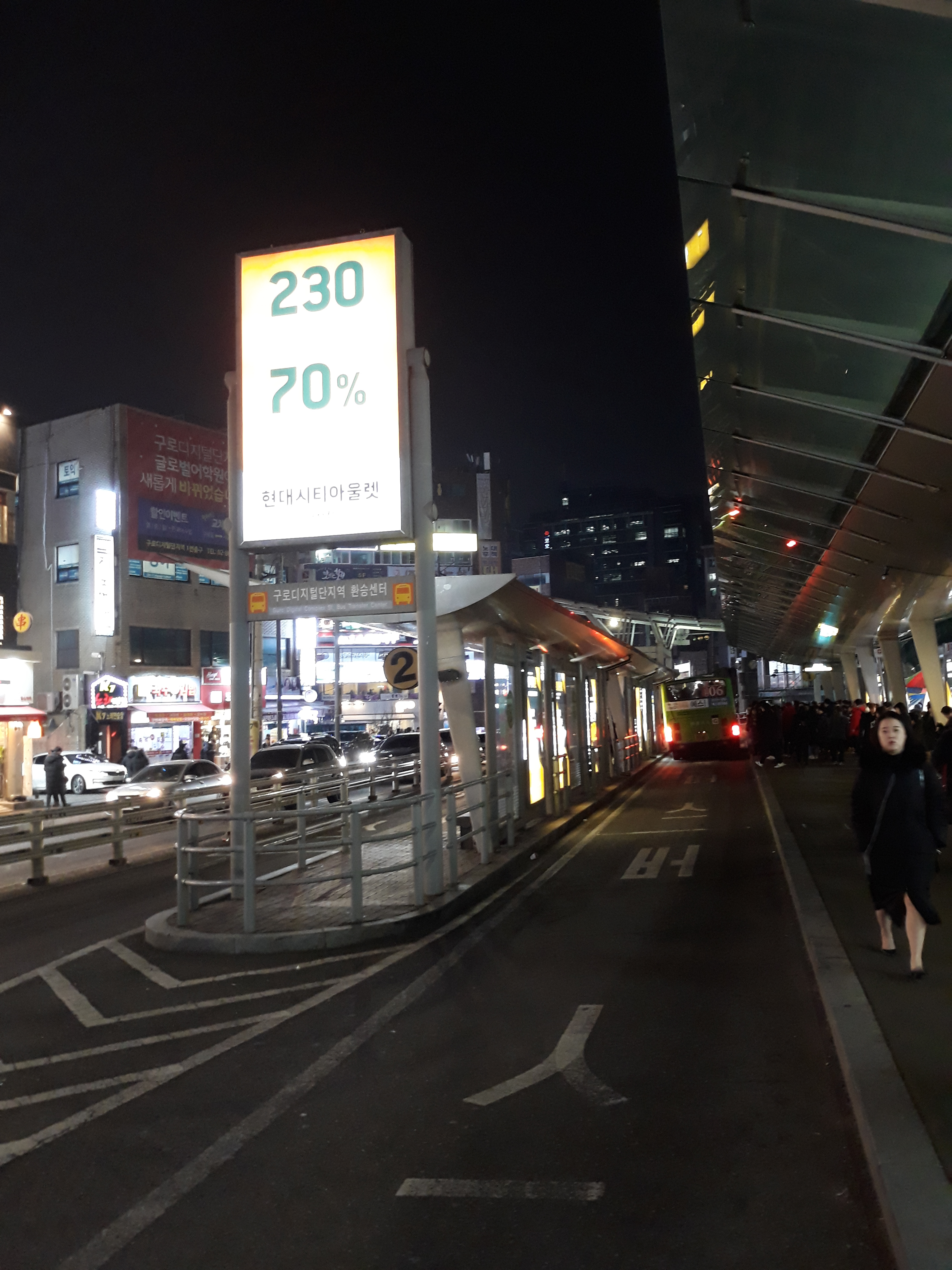 서울 지하철 2호선 구로디지털단지역 버스 환승센터